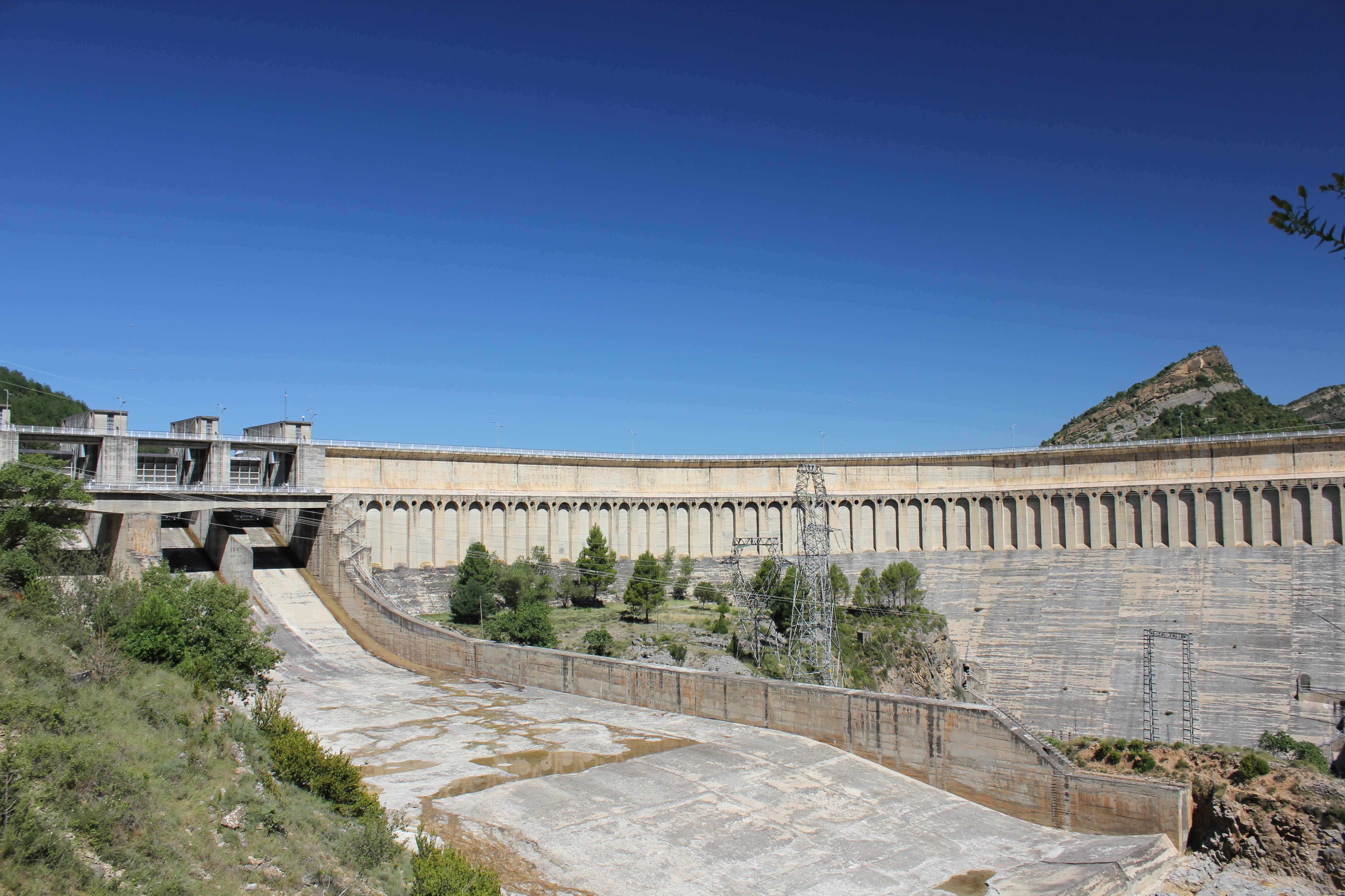 Aragonés: A presa de l'embalse de Mediano.